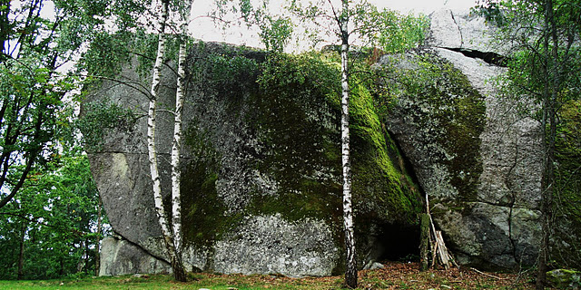 Borgaberget från öster